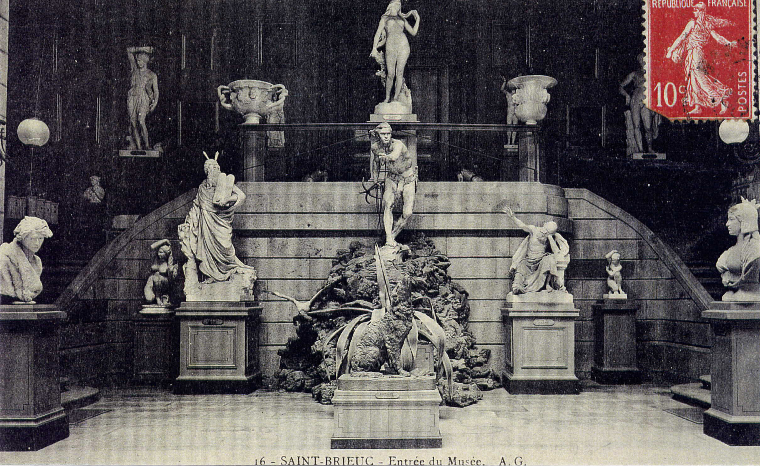 Paul Guibé Esquisses pour la chaire monumentale, Ancien Musée de Saint-Brieuc (?). Plâtre. Les deux esquisses sont le Moïse et le Jérémie à droite et à gauche devant le mur de l'escalier